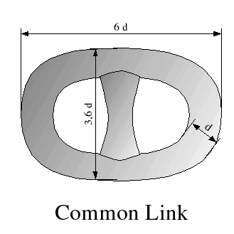 Common link (part of a shackle). maille (partie d'une ligne de mouillage de navire)